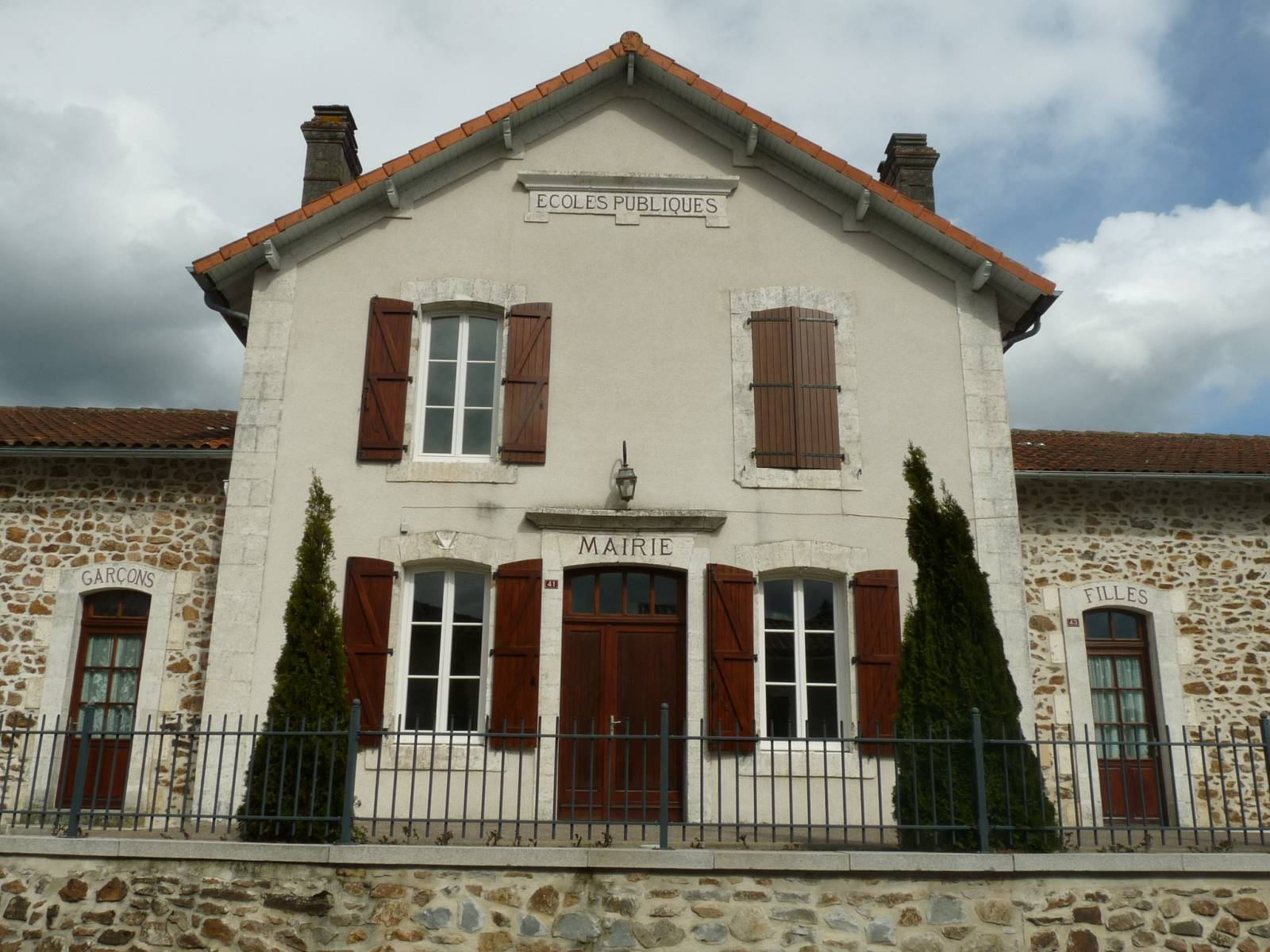 mairie de La Péruse, Charente, France